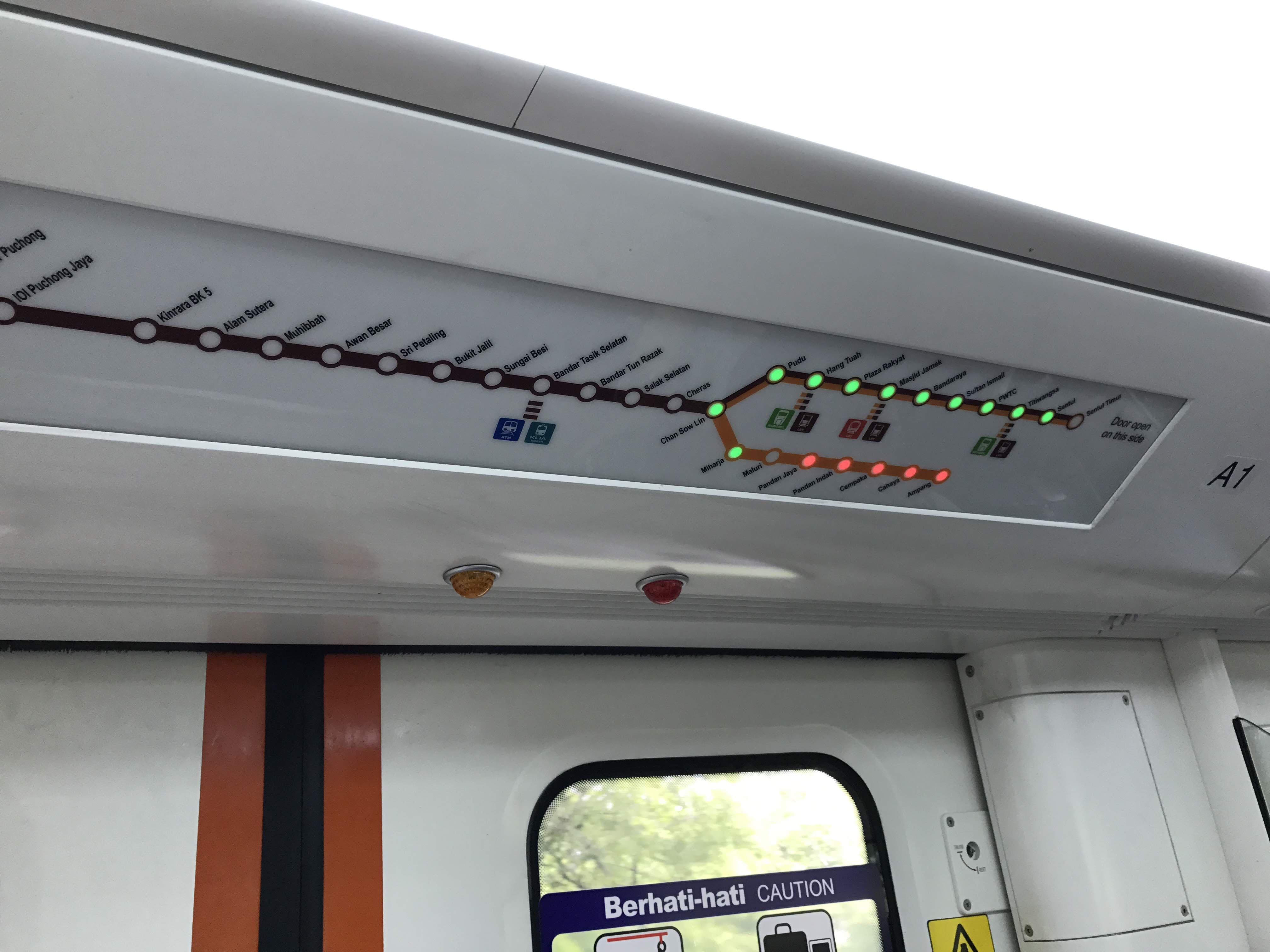 安邦綫的閃燈路綫圖